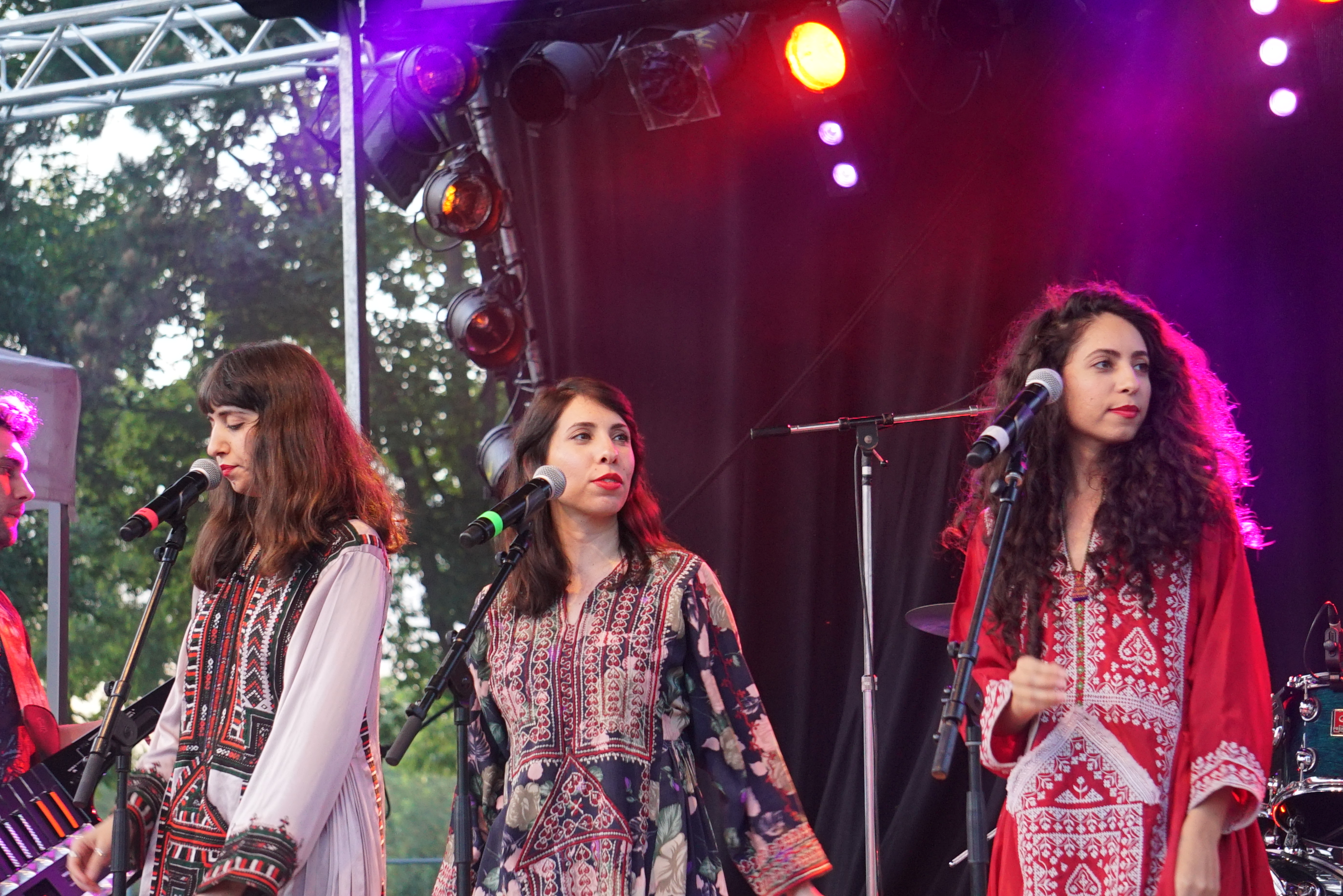 en concert lors de " Musiques d'ici et d'ailleurs", à chalons en 2016.